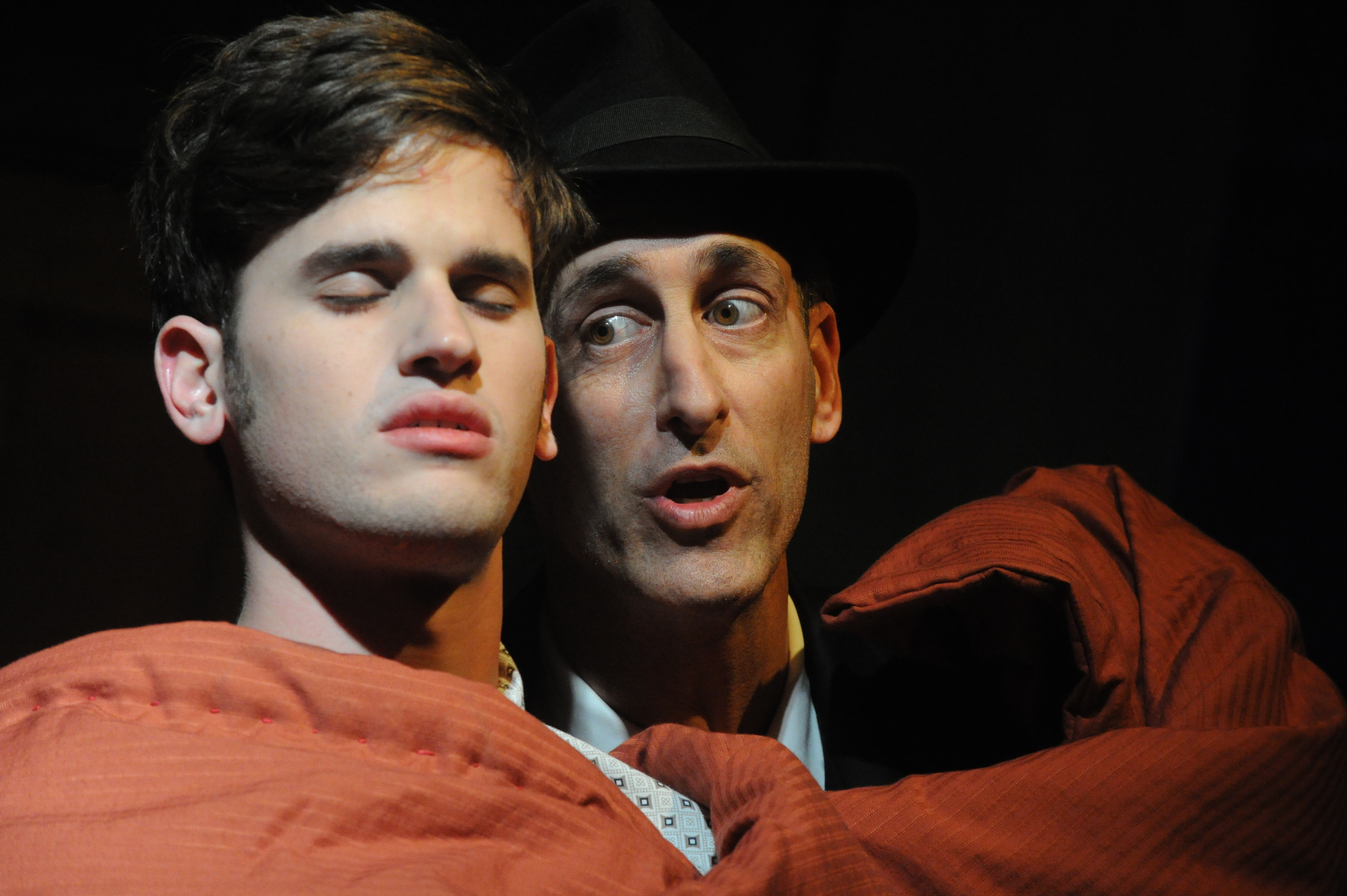 ניר רון ואריאל וולף בהצגה "חוקר פרטי", מאת ובבימויו של מיקי גורביץ', תיאטרון החאן, 2011